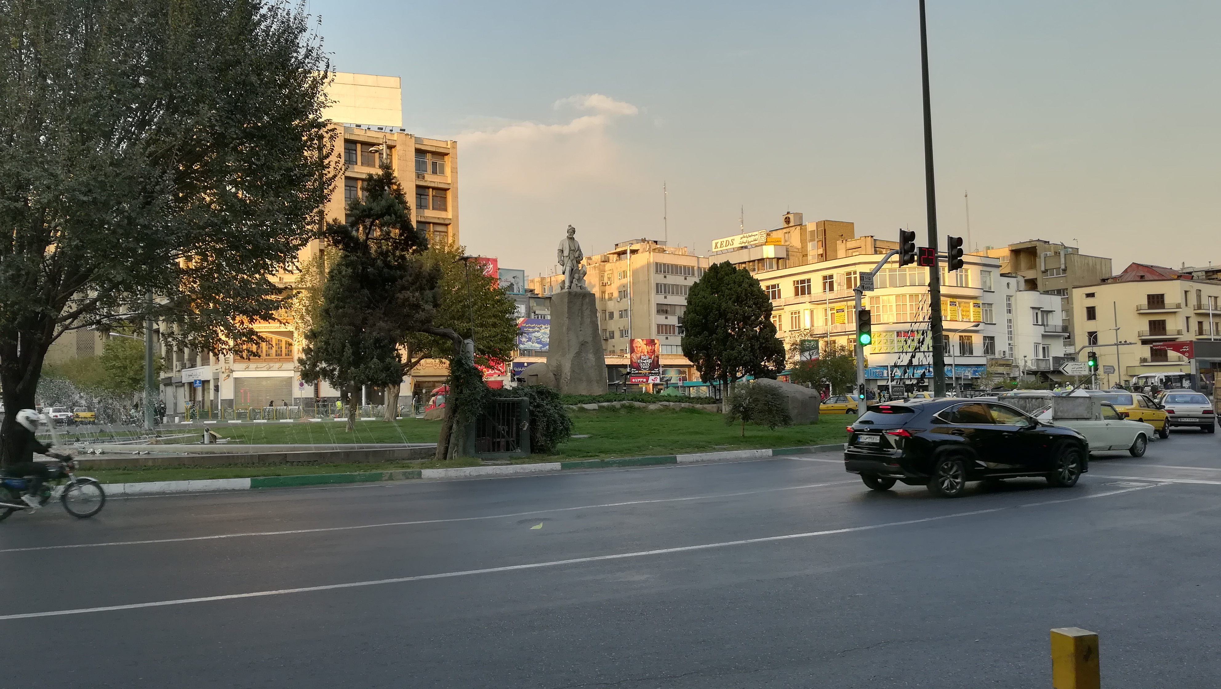 Ferdousího náměstí v Teheránu